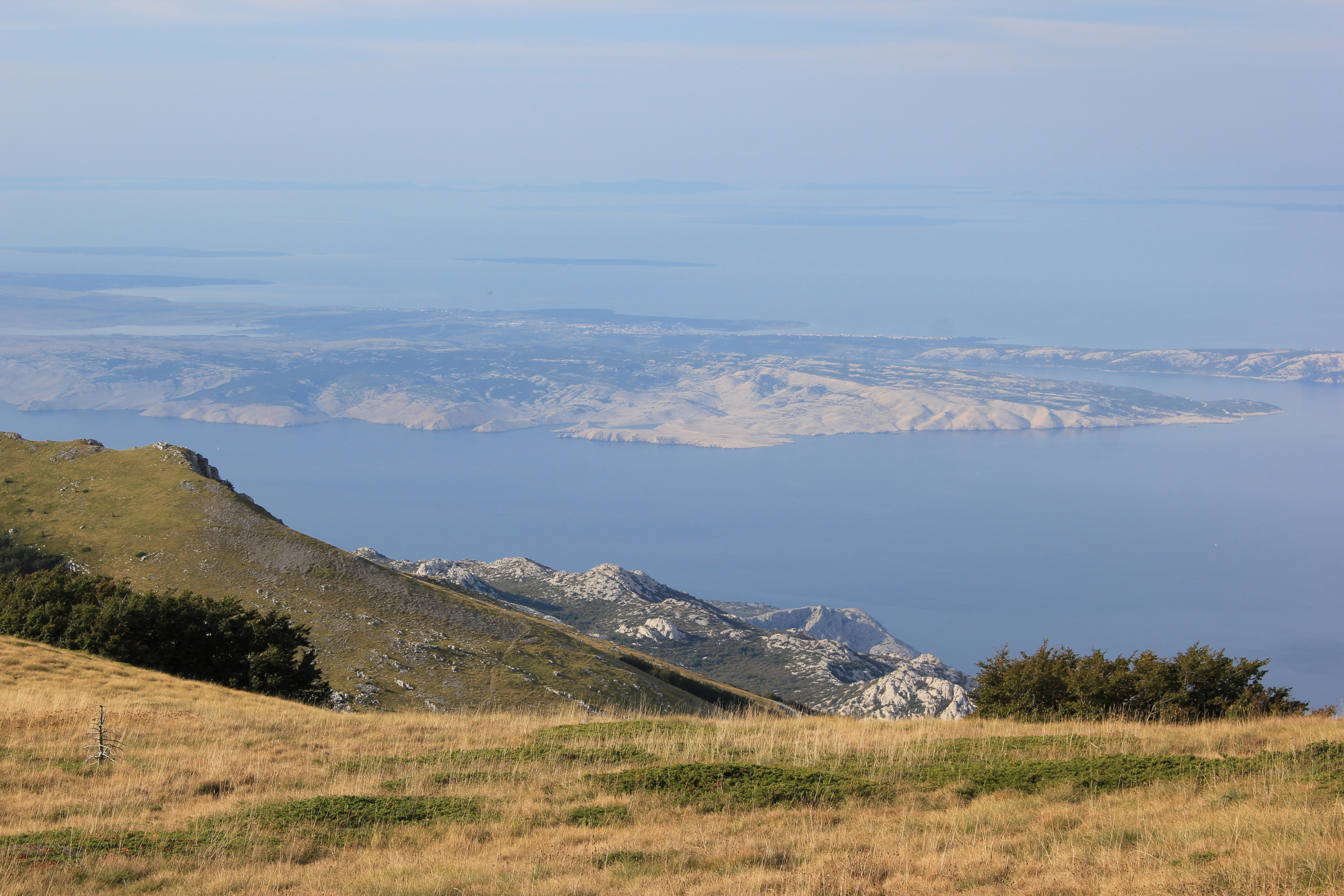 Hornjoserbsce: Wuhlad z Alančića we Velebitskich horinach, Chorwatska.